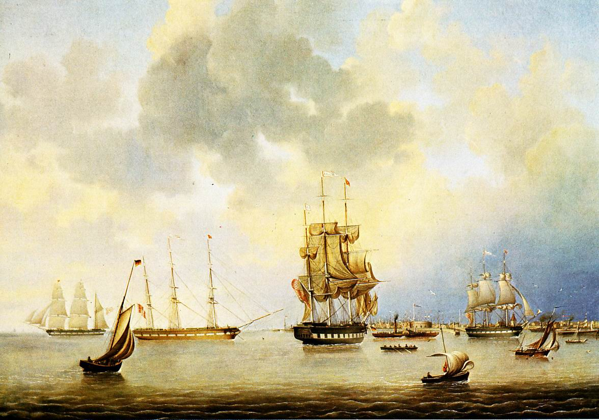 Bremerhaven, Reede 1848 Scanner: Benutzer Geoz, Canon Pixma MP 110